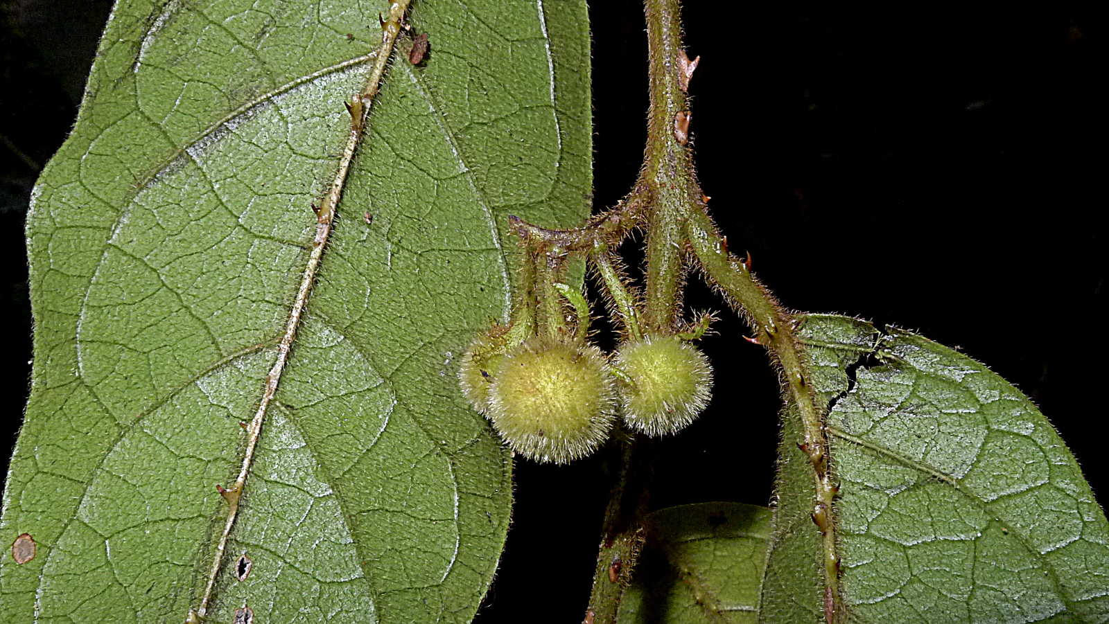 Solanum rupincola Sendtn.